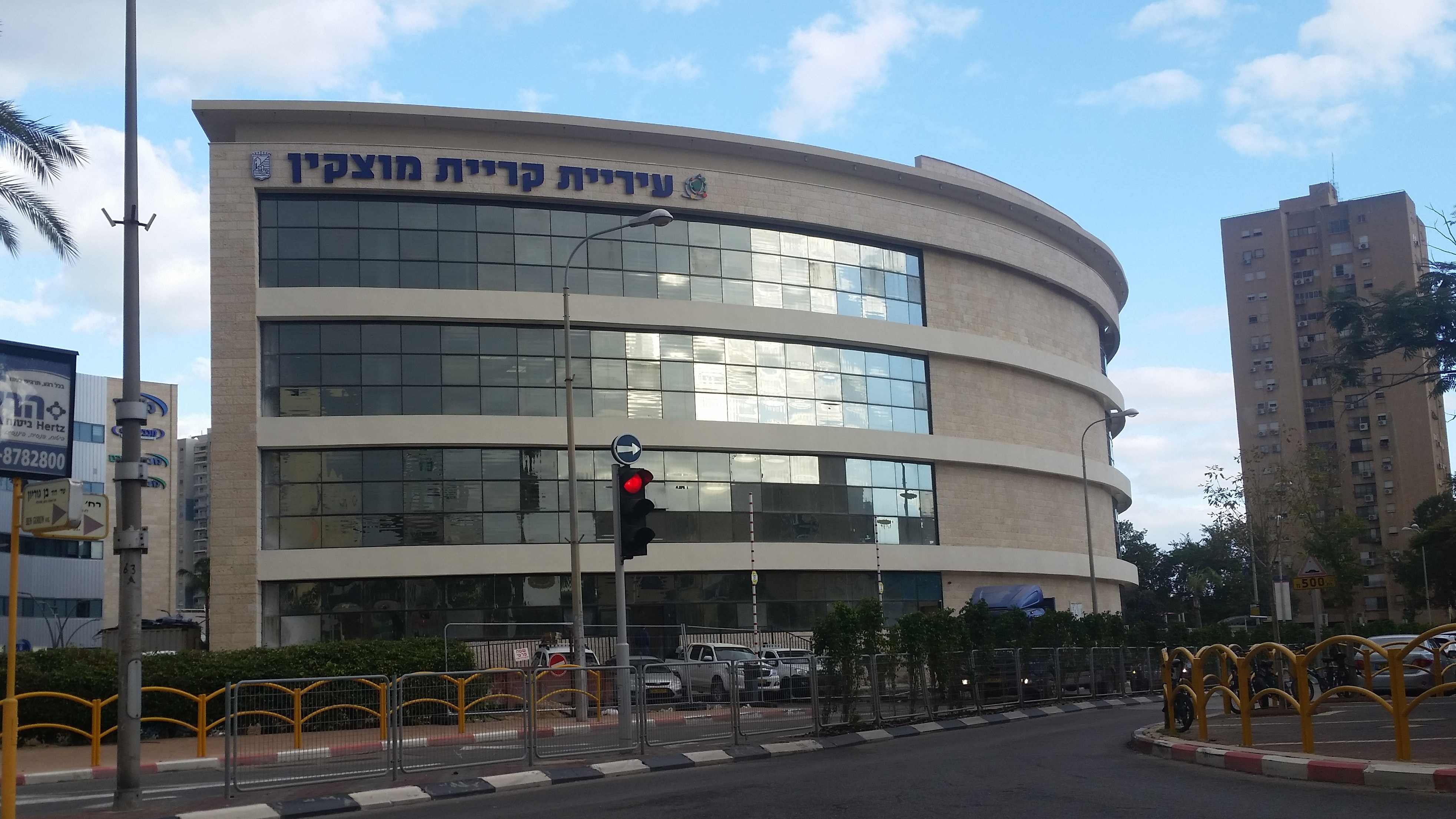 מבנה בית העירייה של קריית מוצקין, בסוף בנייתו, דצמבר 2017